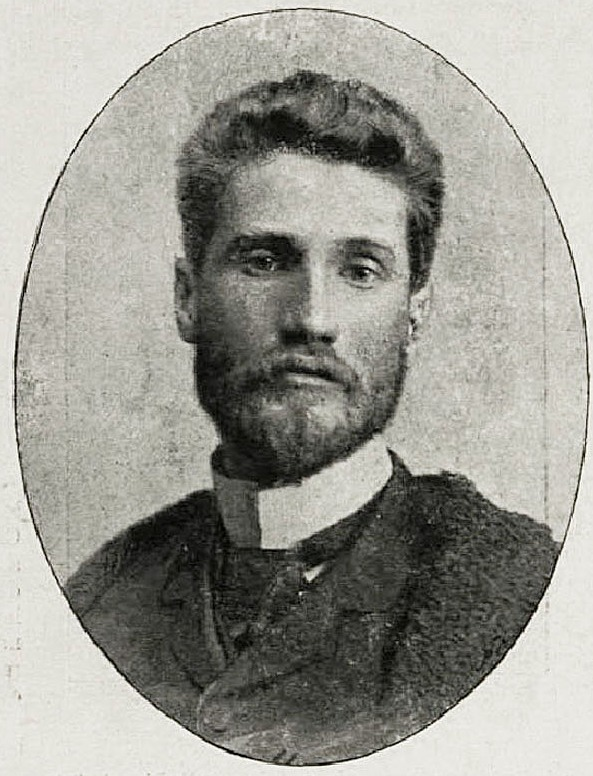 Justh Zsigmond magyar író.